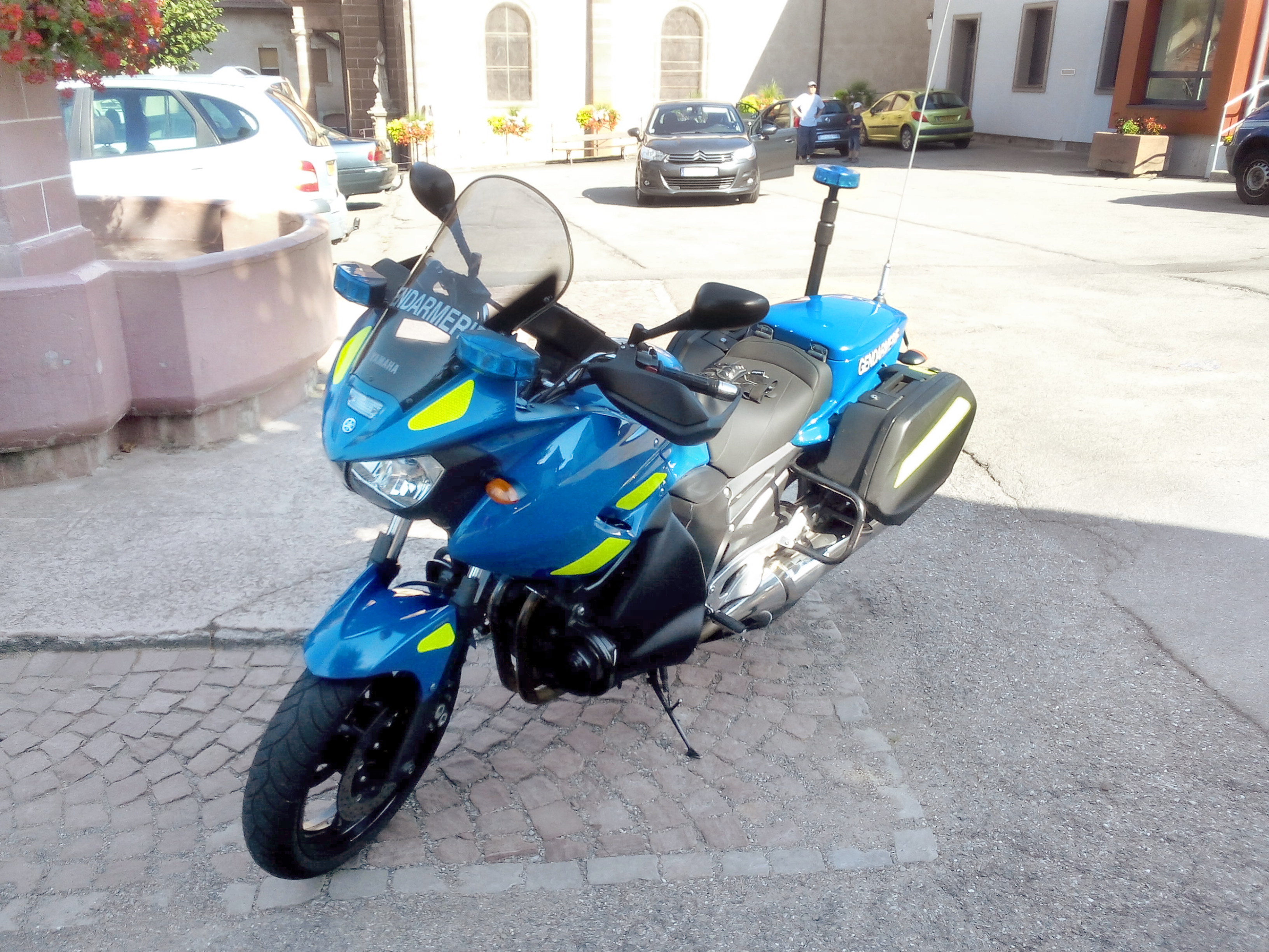 Yamaha TDM 900 de la Gendarmerie nationale avec la sérigrapghie fluo, 2015